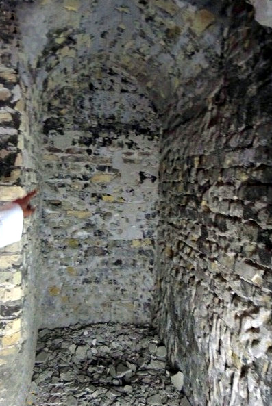 زندان سندی بن شابک، محل زندانی بودن و شهادت موسی کاظم